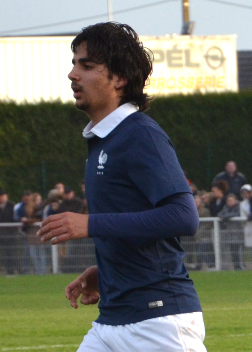 Photographie prise lors du match opposant la France à l'Angleterre pour les qualifications du championnat d'Europe de football des moins de 19 ans 2015 au stade Louis-Villemer de Saint-Lô le 31 mars 2015. Ici, Samed Kilic